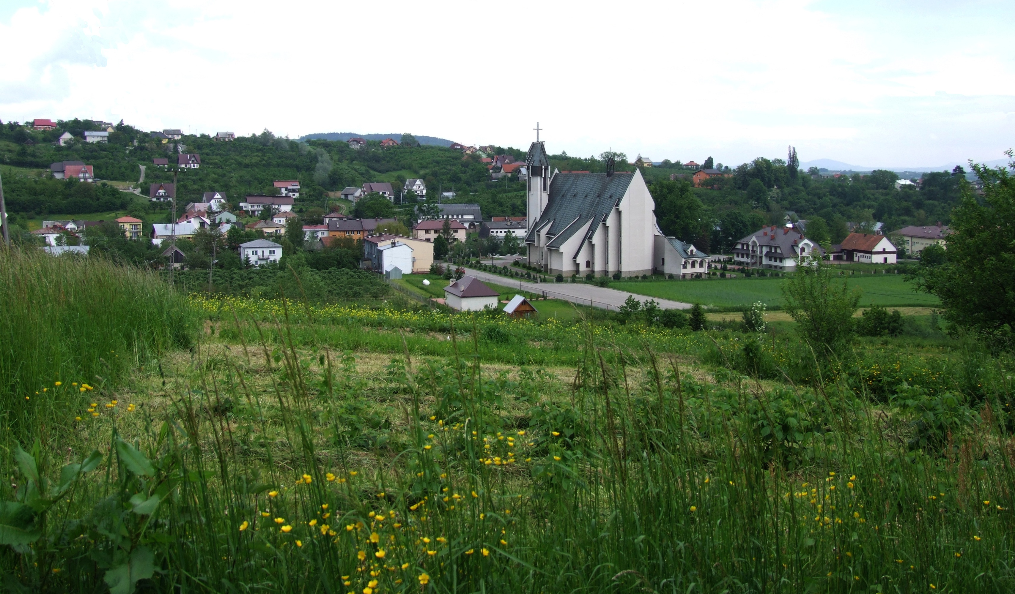 Miejscowość Łukowica